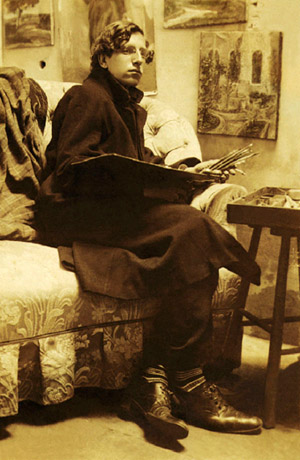 Fotografía de Carlos Valenti, 1912